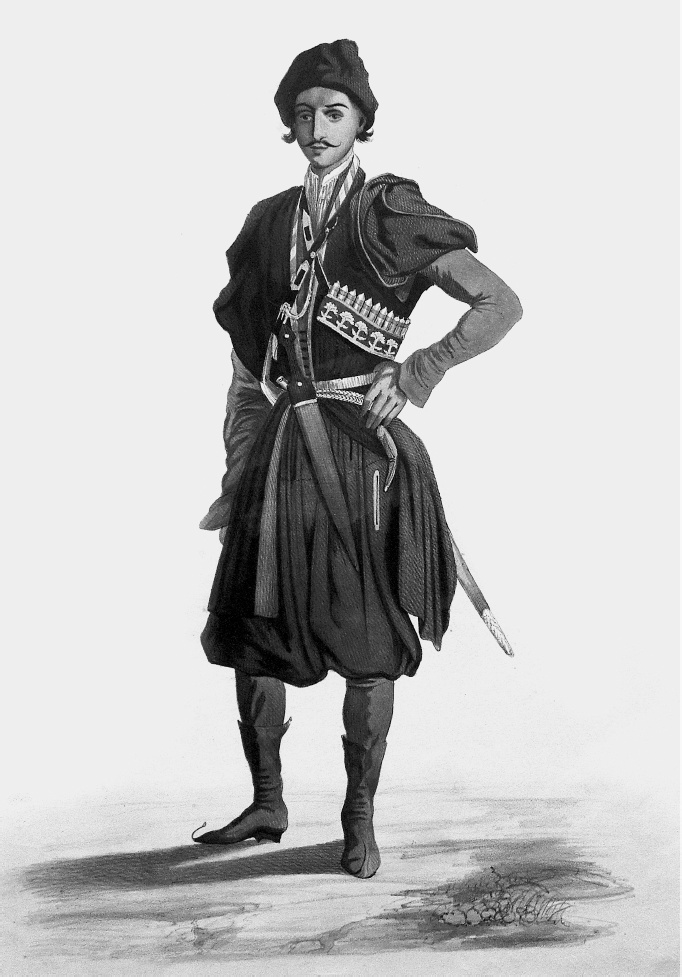 Картина русского художника XIX века Г. Г. Гагарина